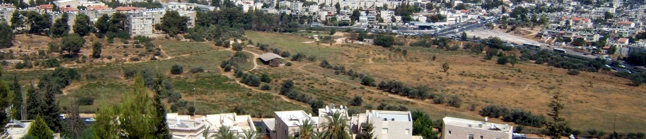 emek Hatzvaim, from Bait Vagan